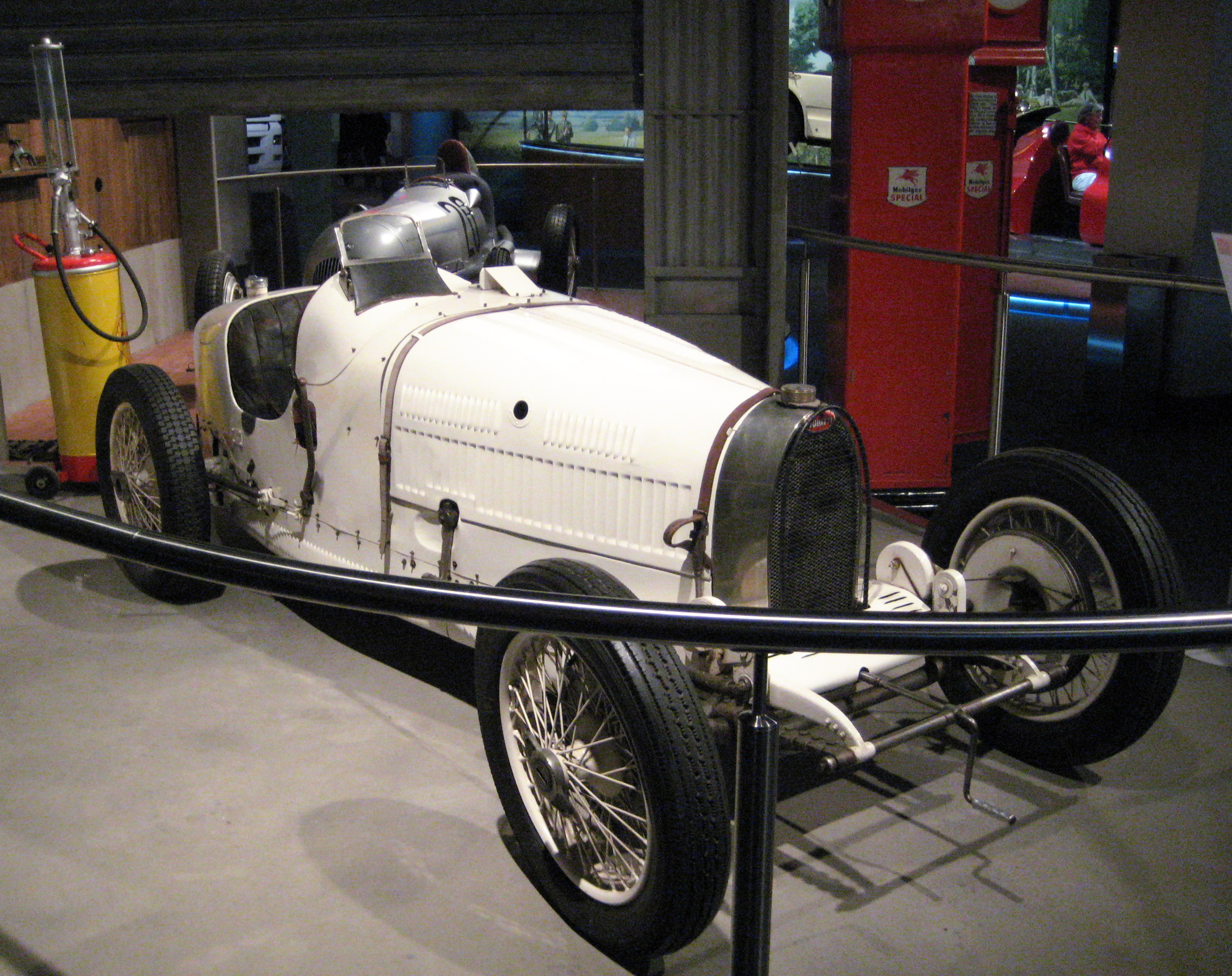 Bugatti Type 37A aus dem Eröffnungsrennen am Nürburgring 1927, in der Ausstellung ringwerk